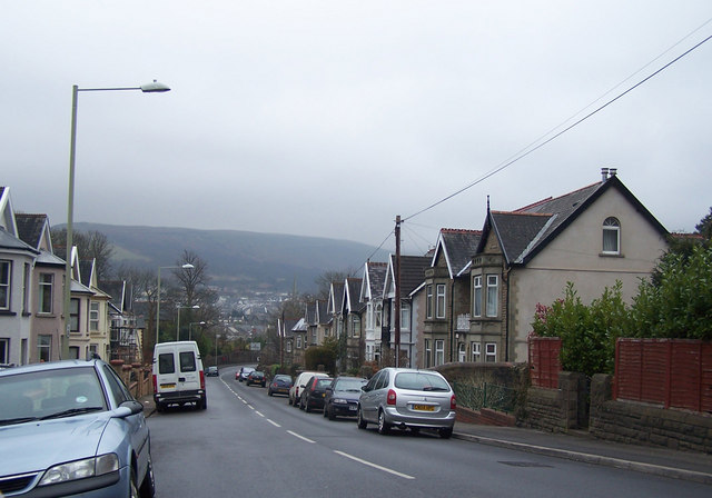 Abernant, Rhondda, Wales